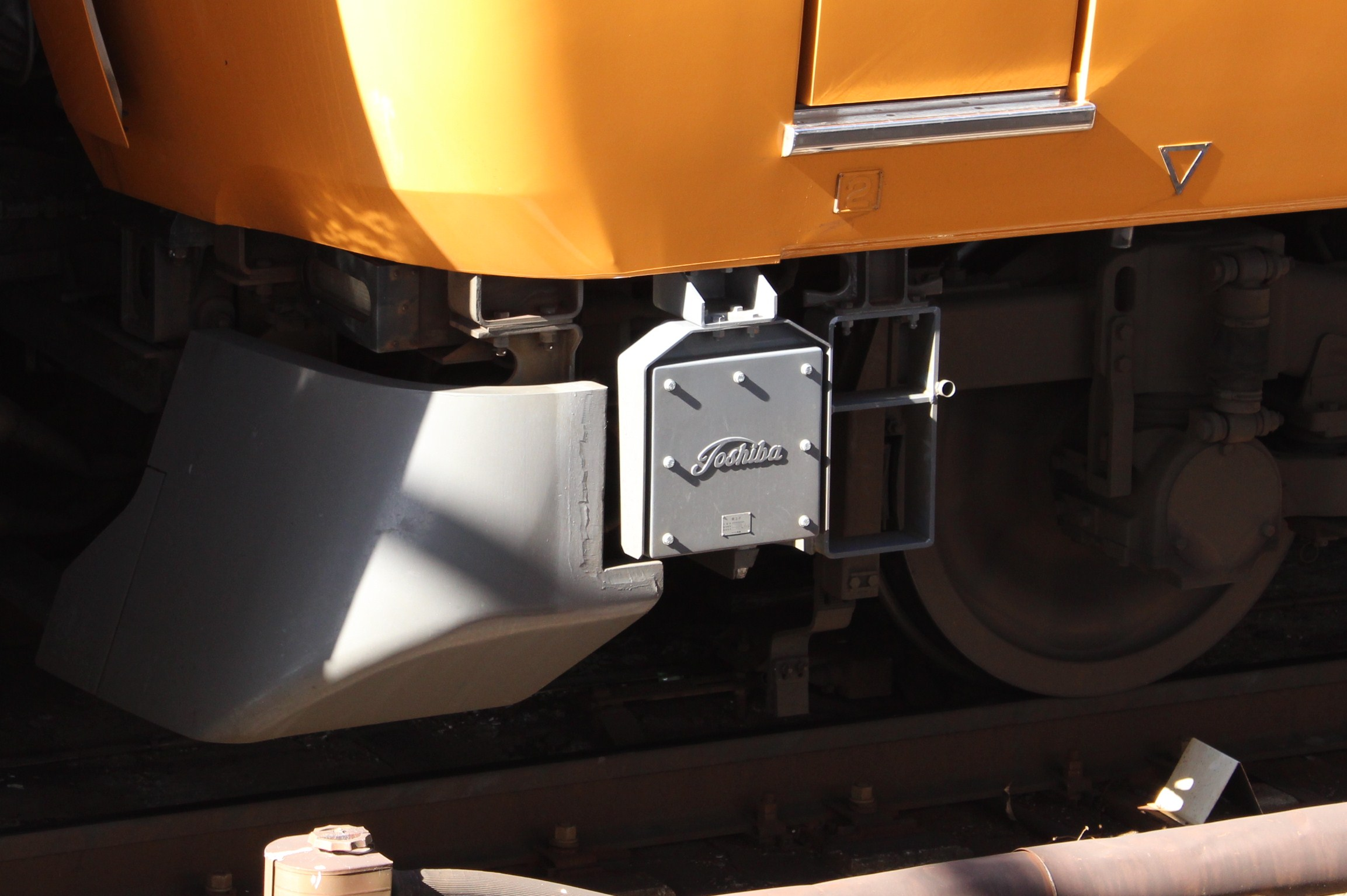 22600系阪神用ATS